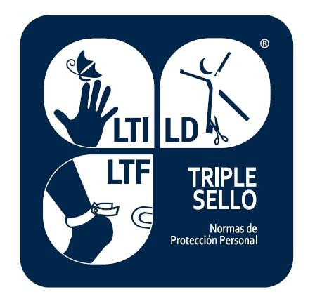 Logo del Triple Sello con mensaje en recuadro azul. Propiedad intelectual del Instituto Boliviano de Comercio Exterior.